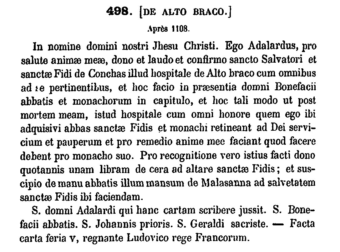 Tiré du cartulaire de l'abbaye de Conques en Rouergue, la donation d'Adalard.